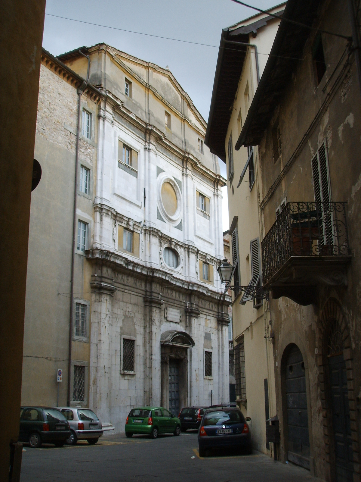 Santa maria corteorlandini